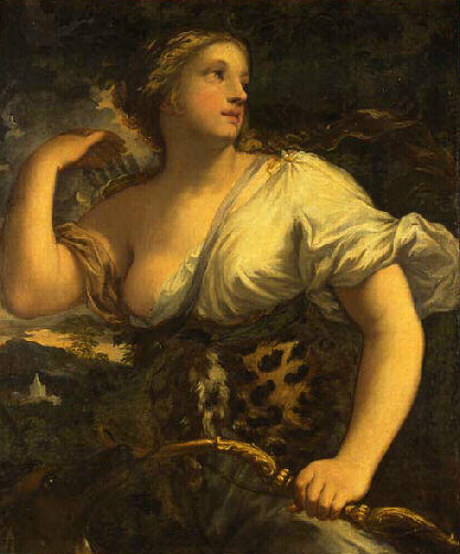 Diana Cazadora